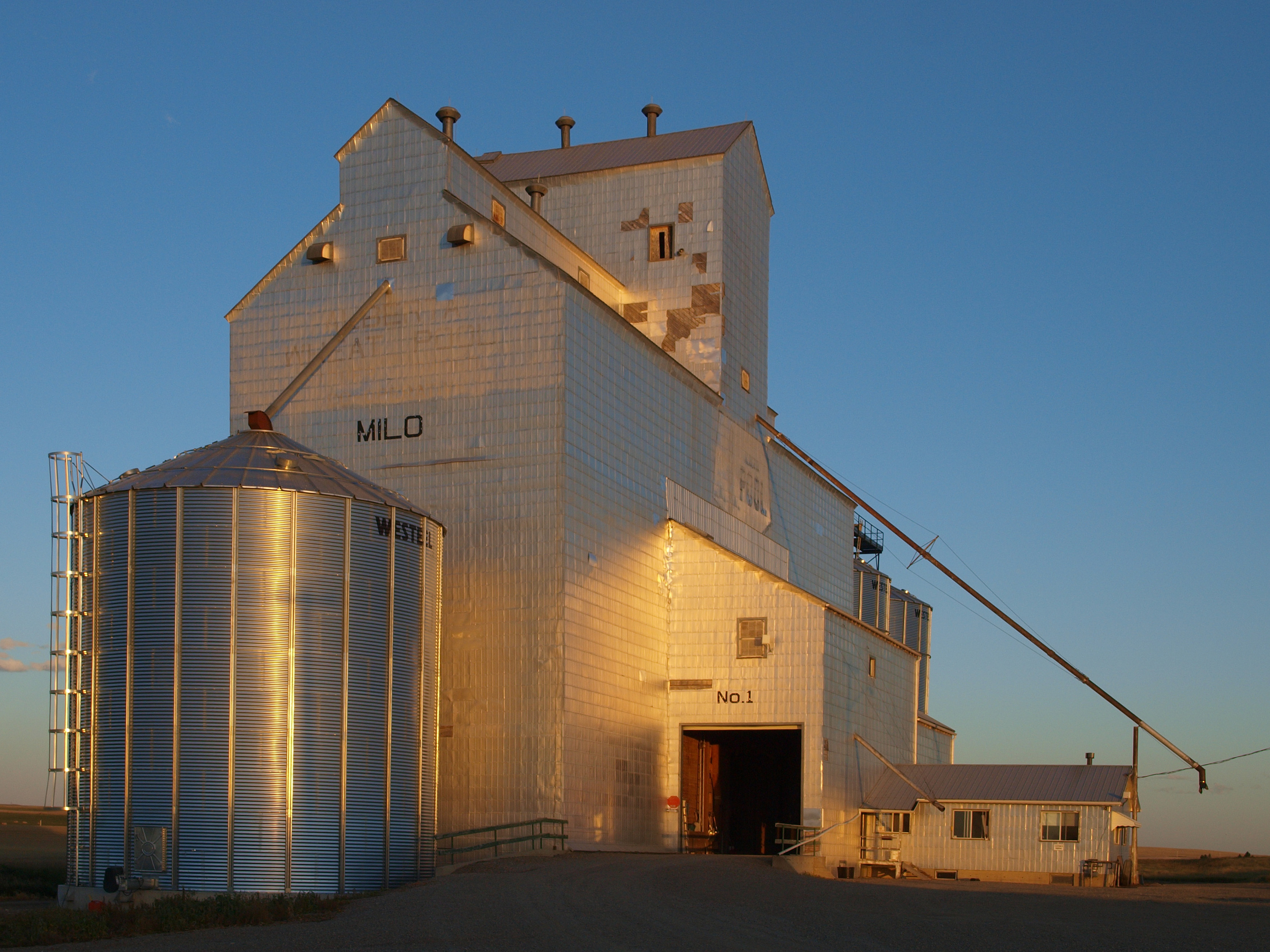 Milo Grain Elevator